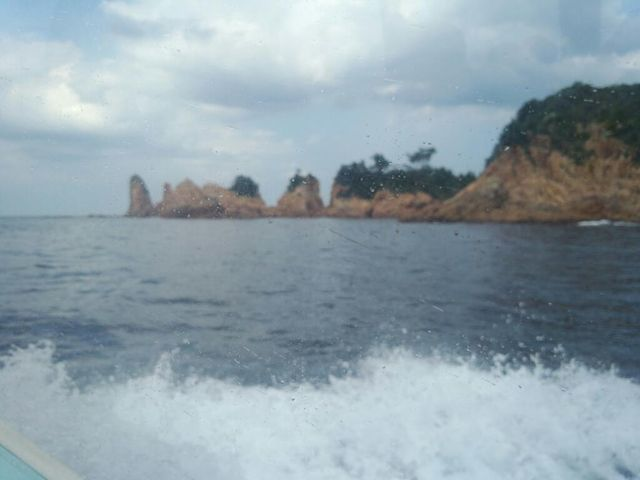 山口県長門市青海島の海上アルプス